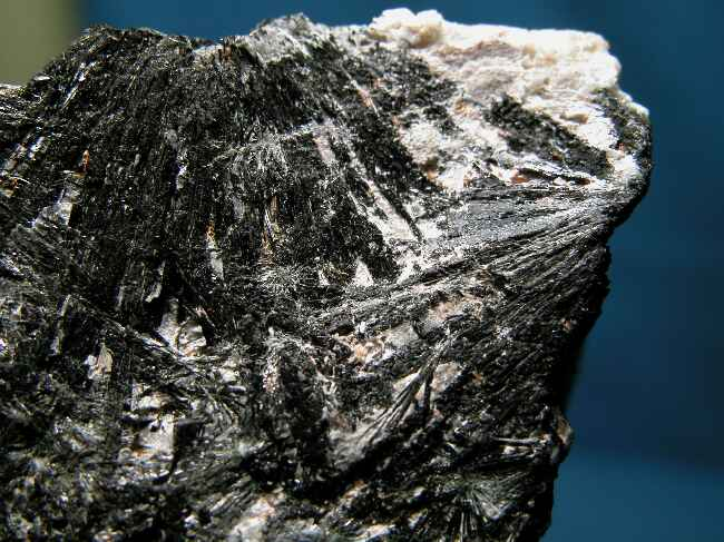 minerał egiryn, pochodzenie Rosja, płw. Kolski, Chibiny: autor zdjęcia Piotr Menducki 10.08.2006r